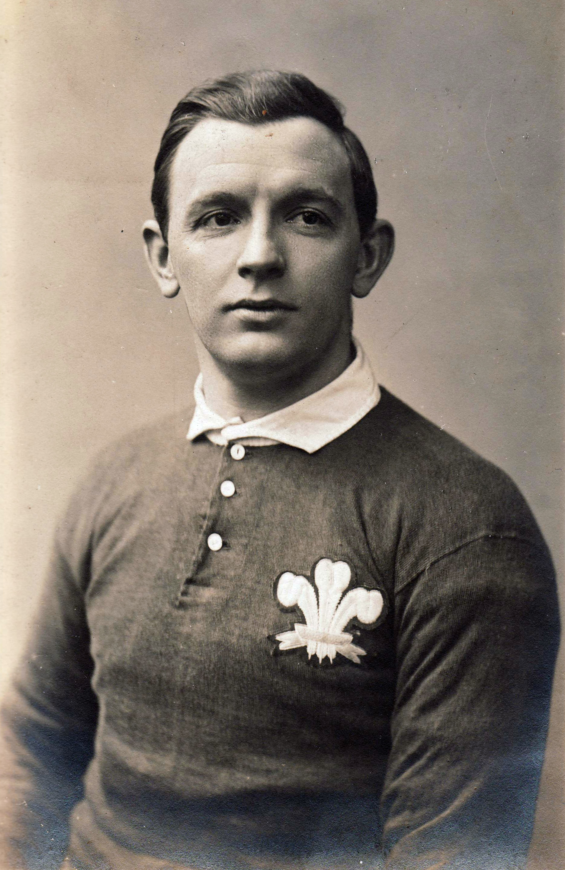 Phil L. Hopkins Wales 1908-1910 Philip Hopkins, né le 31 janvier 1880, était un joueur de rugby gallois, évoluant au poste d'ailier pour le Pays de Galles. Né à Pontardawe, Philip Hopkins a disputé son premier test match le 12 décembre 1908 contre l'équipe d'Australie, et son dernier test match fut contre l'équipe d'Angleterre le 15 janvier 1910. Il joue 4 matchs. Il participe à la triple couronne en 1909.